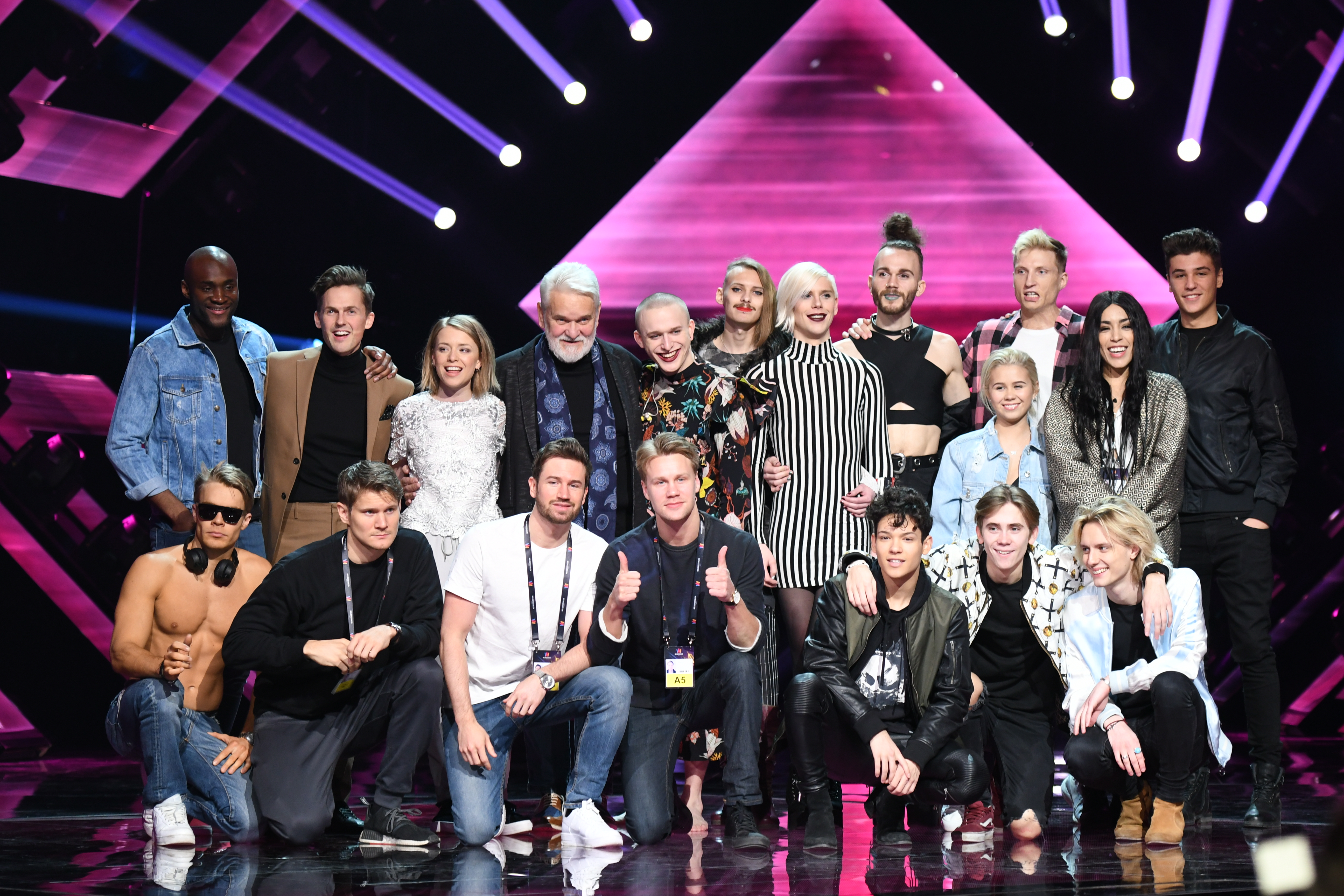 Alla deltagare och programledare på presskonferensen på torsdagen inför andra chansen.